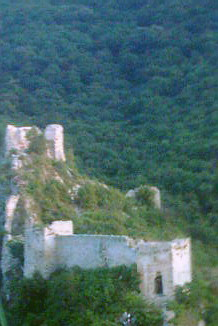 Fortress Soko Grad near Sokobanja, Serbia